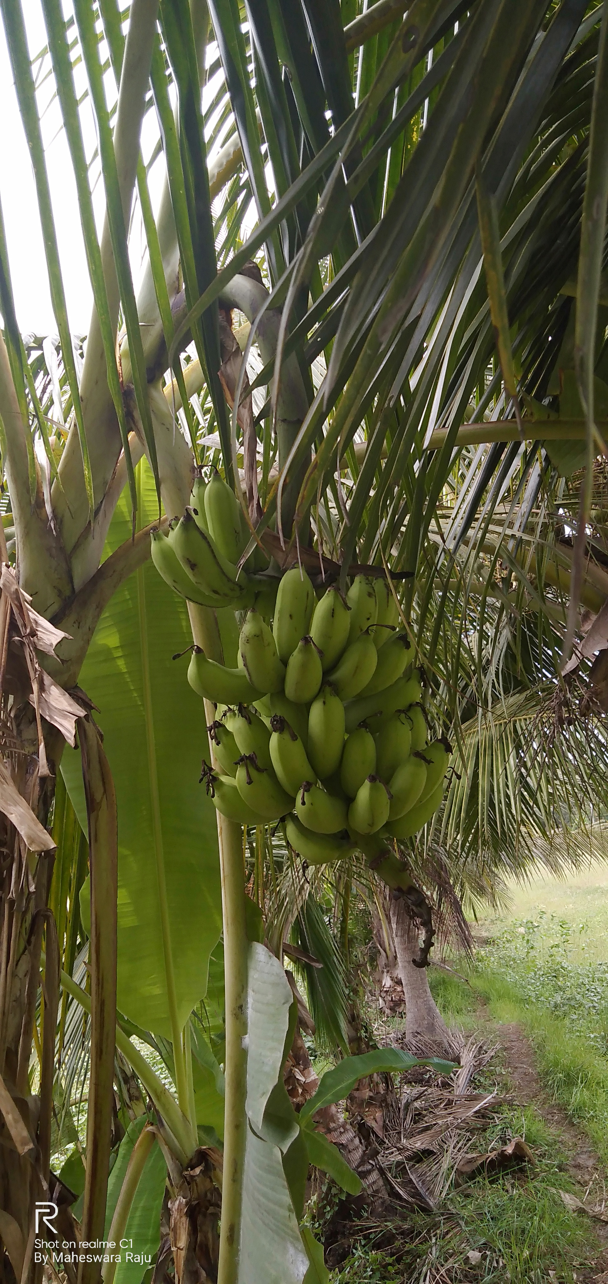 అరటి గెల